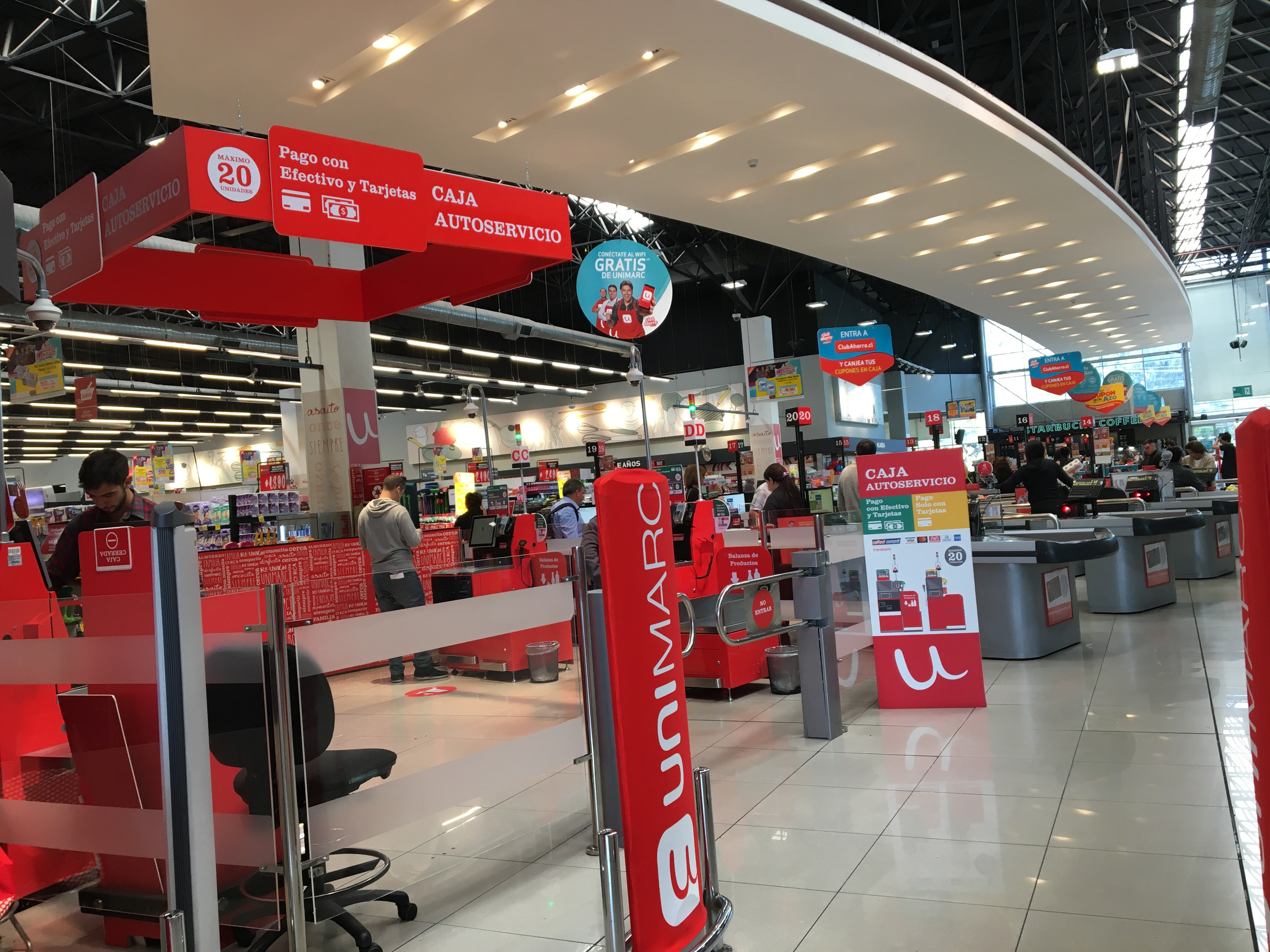 Unimarc